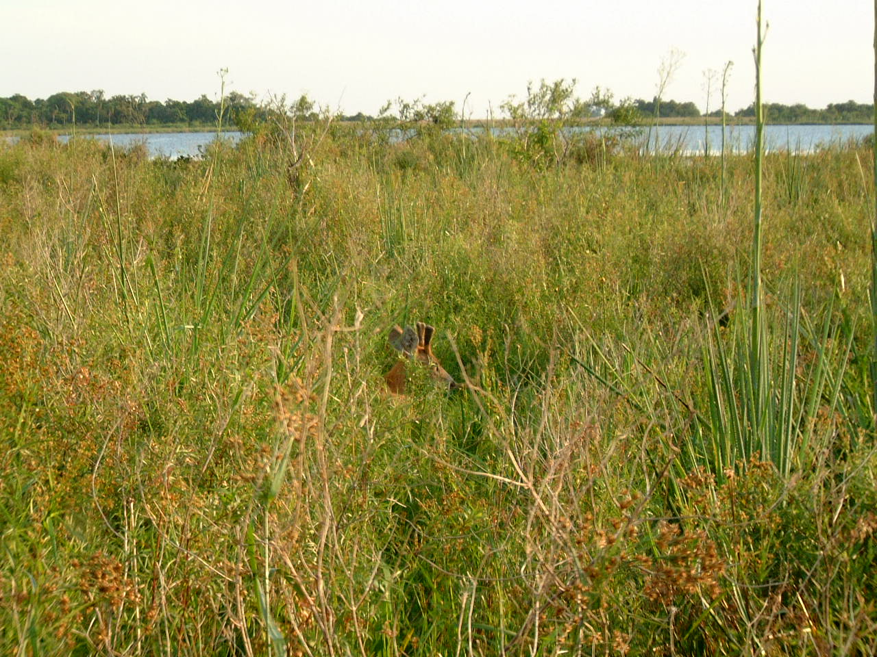 Marsh deer at Esteros del Iberá NP, Argentina